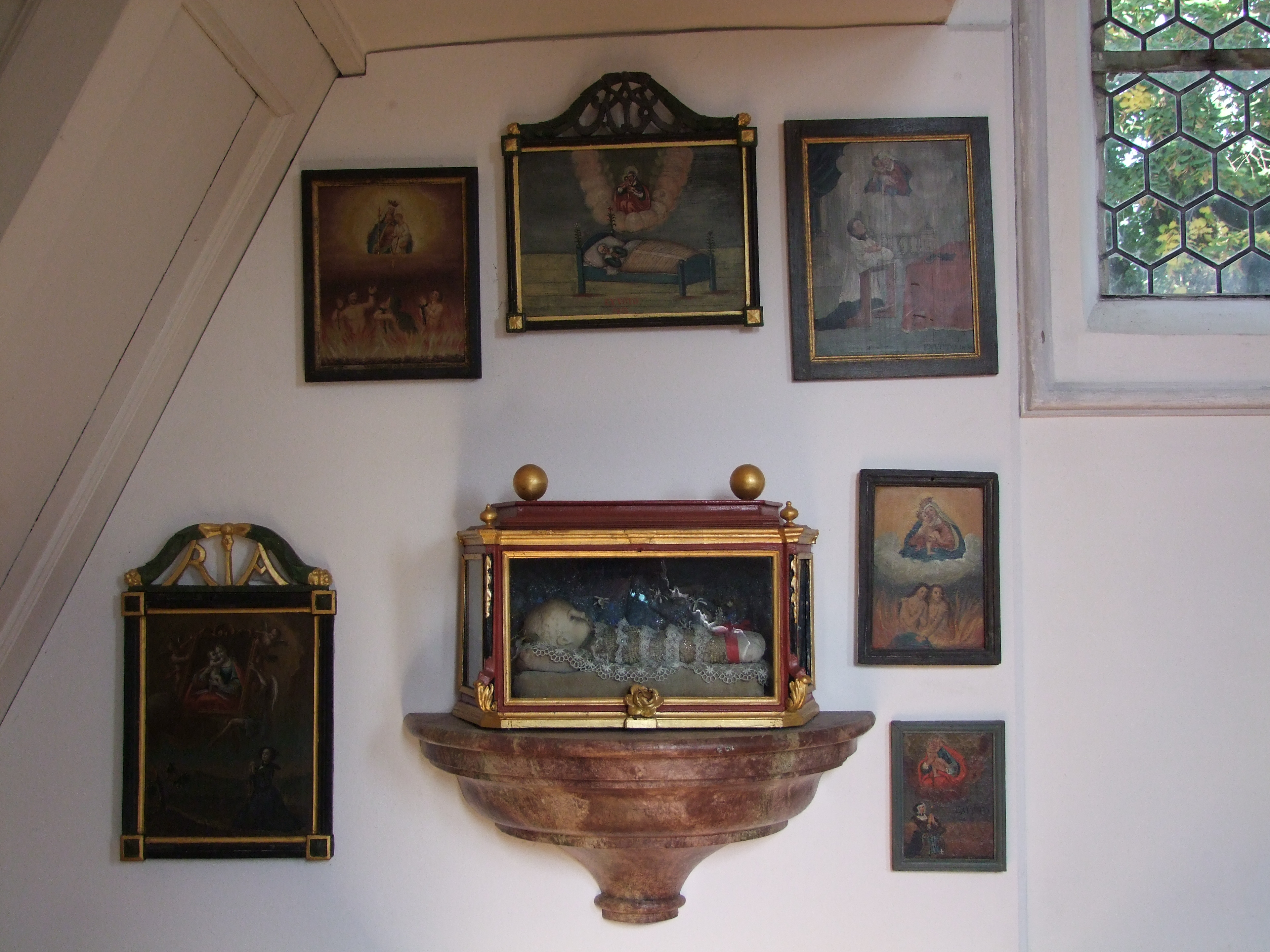 Unserer Lieben Frau im oberschwäbischen Oberrammingen,, Ortsteil von Rammingen in Bayern/Schwaben